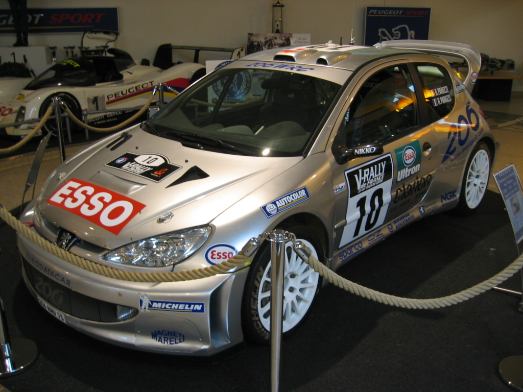 Peugeot 206 WRC car - Musée Peugeot Sochaux